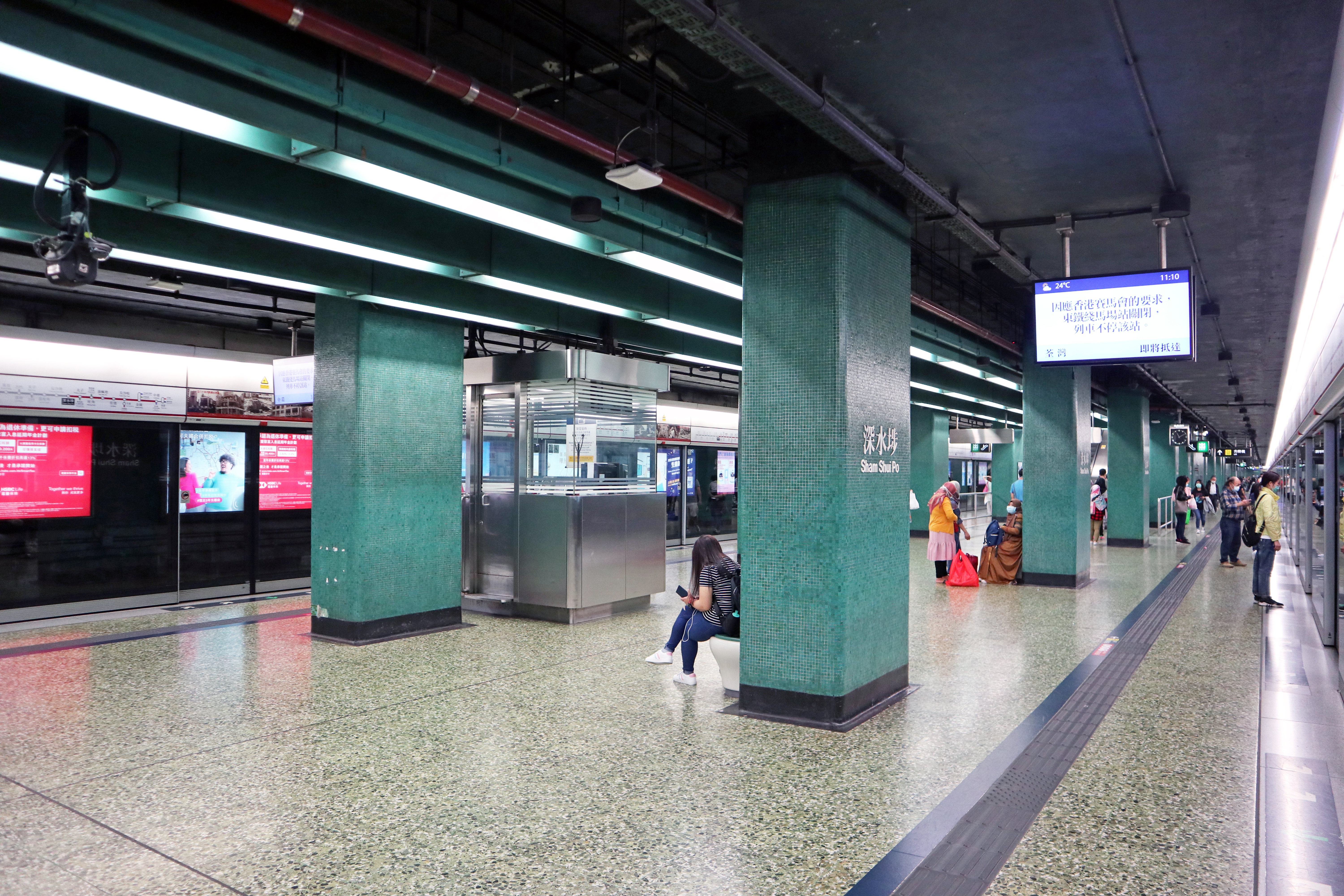 港鐵深水埗站月台